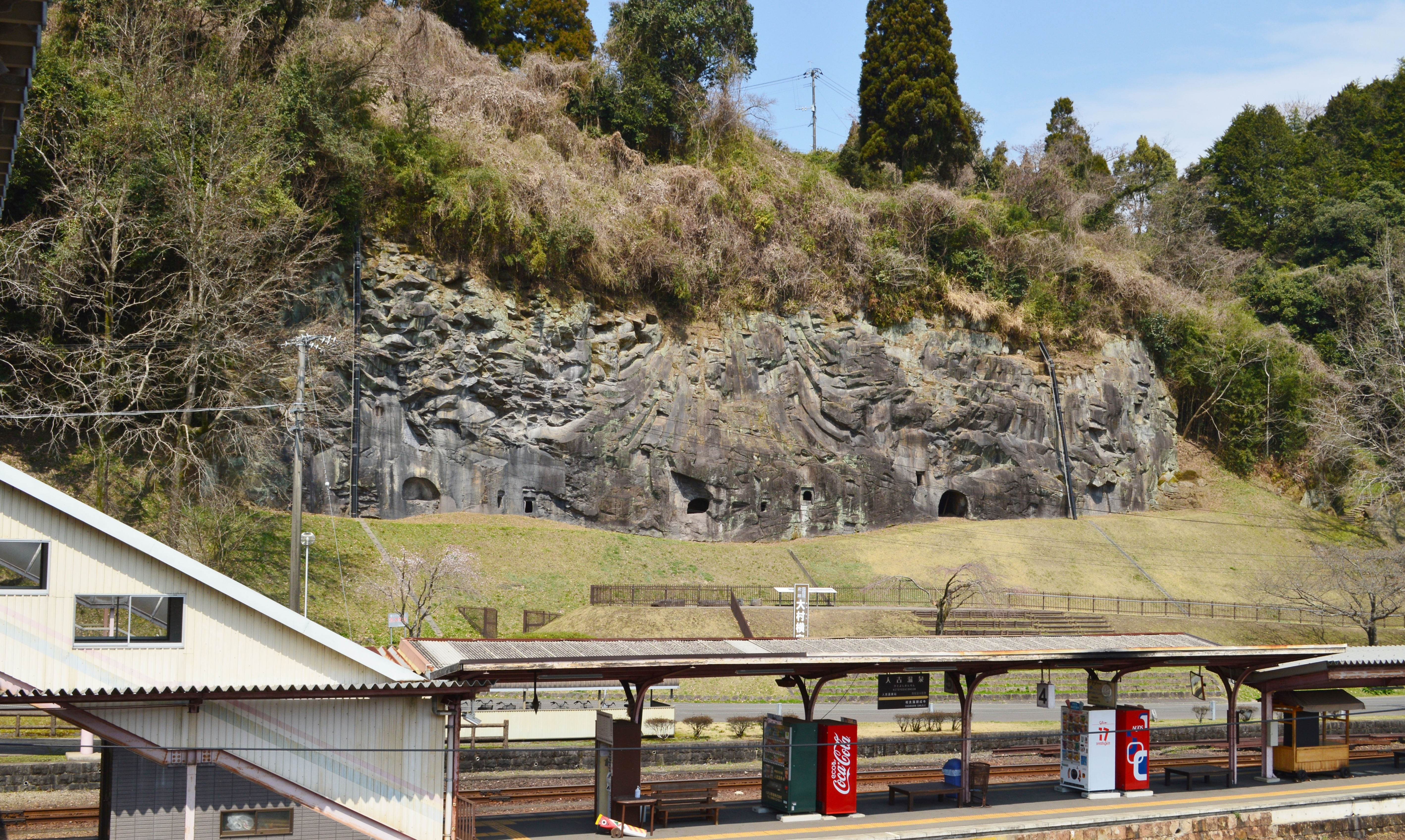 大村横穴群 (人吉駅から望む)